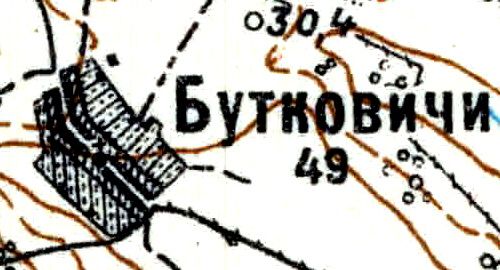 Топографическая карта Ленинградской области, квадрат Vc-29 (Батецкая), деревня Бутковичи